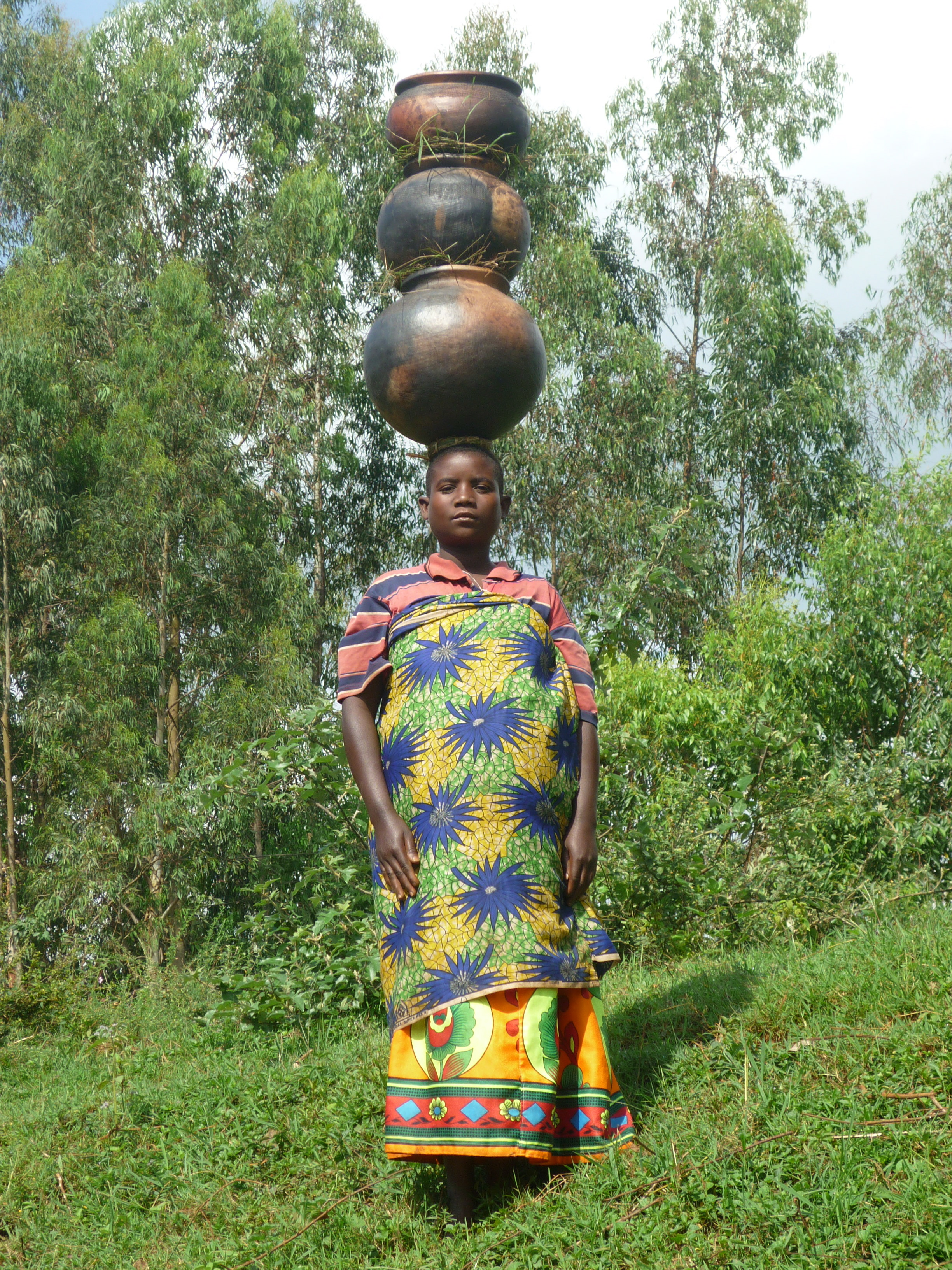 Femme Burundaise en route pour le marché This is an image of "African people at work" from Burundi